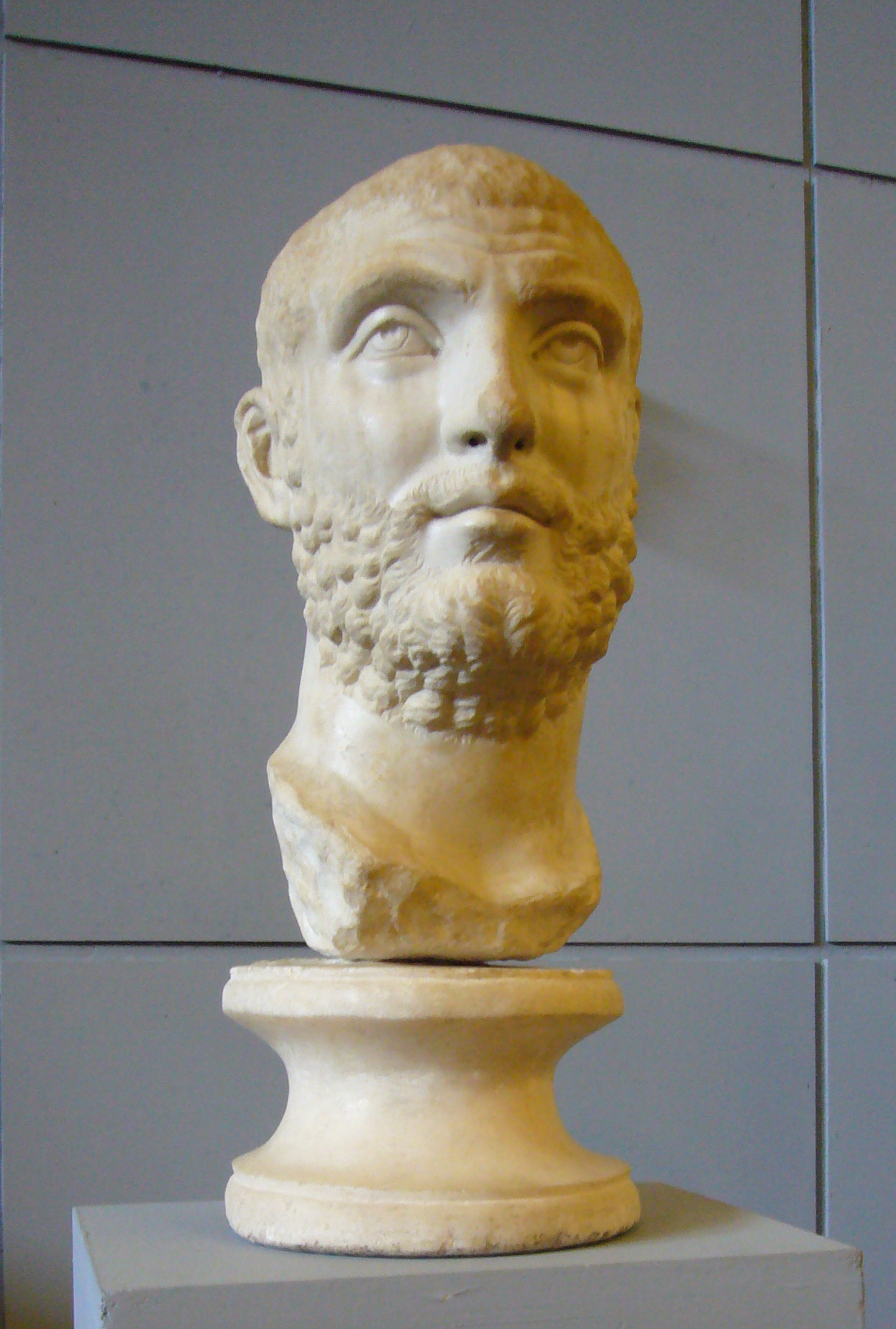 Centrale Montemartini a Roma: ritratto di Carino (257-285)